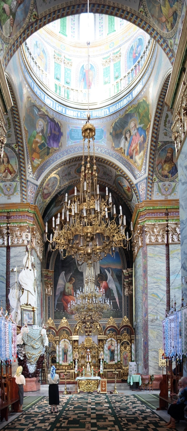 St. George's Church in Chervonohrad, Ukraine (1770s)